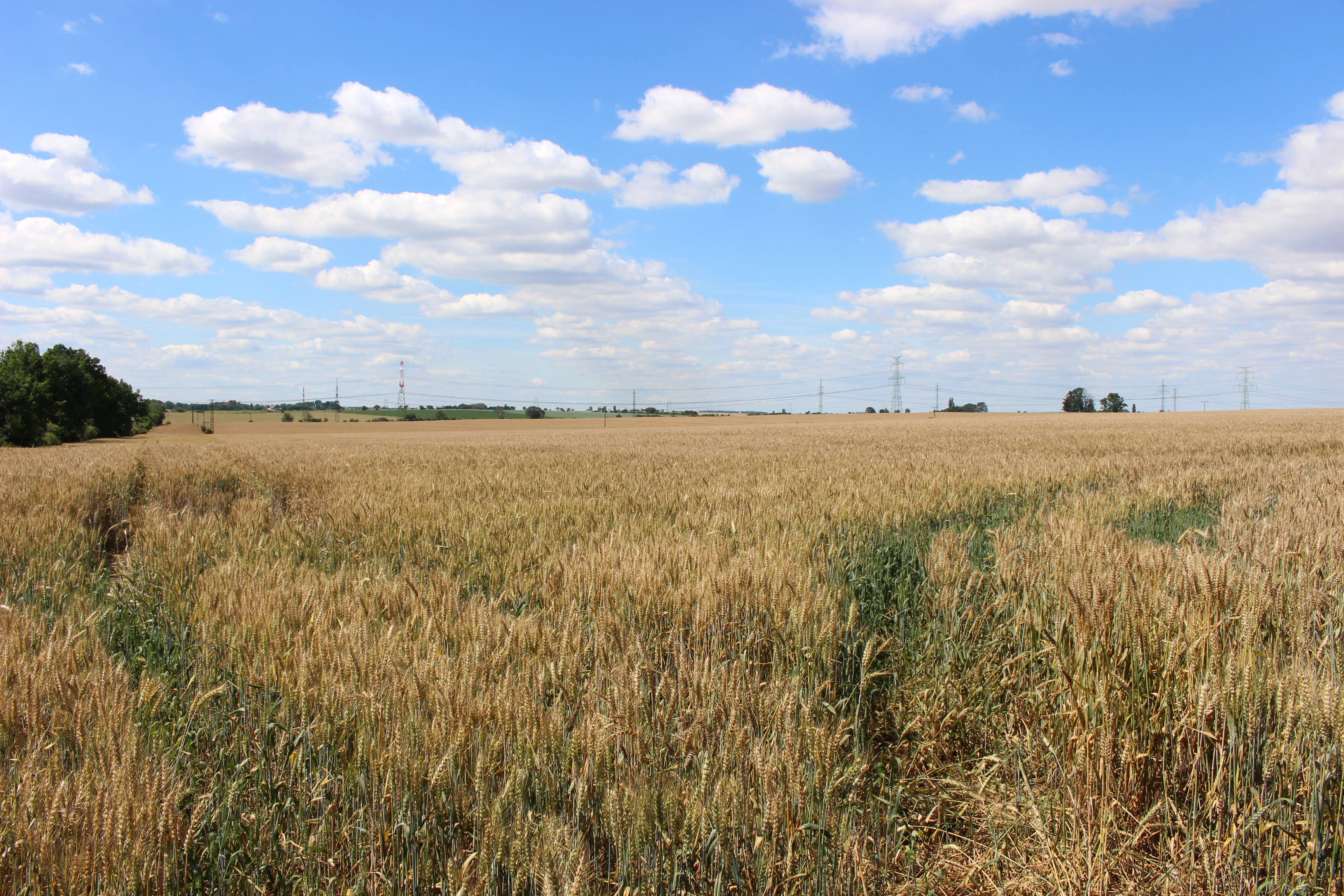 Pohled do míst, kde stávala zaniklá vesnice Zípce